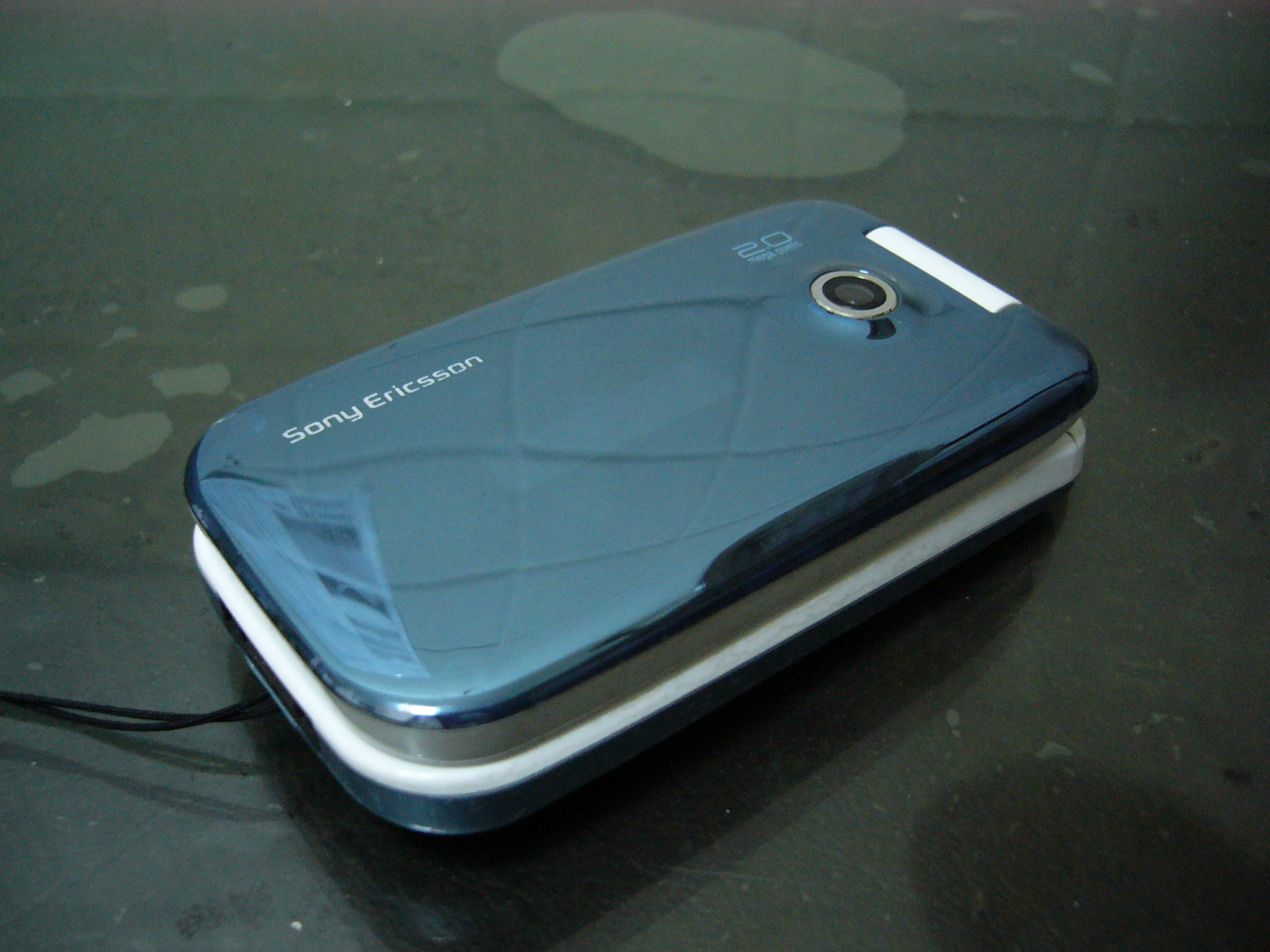 2007年Sony Ericsson Z610i行動電話天藍(Airy Blue)版正面外觀